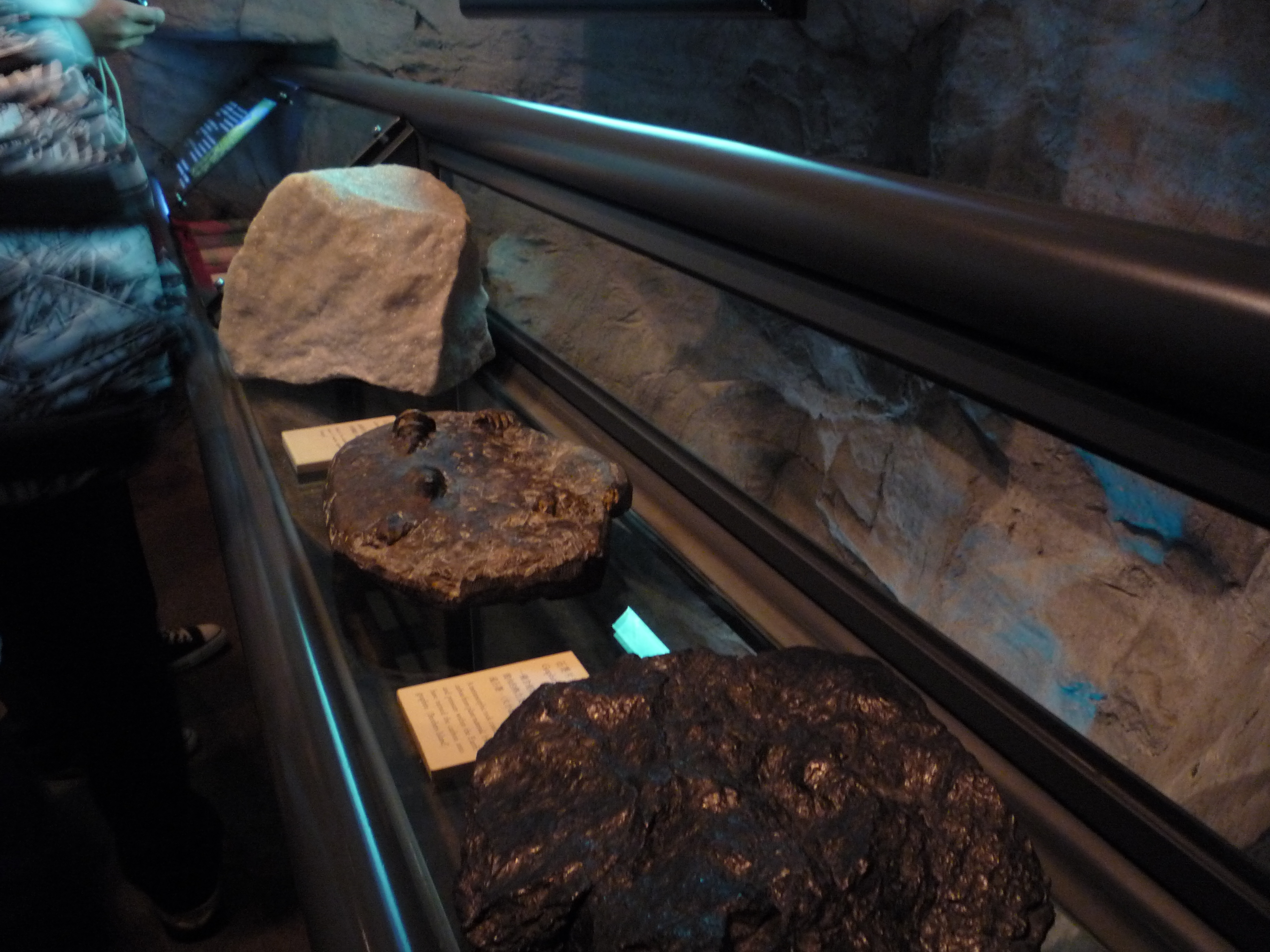 Rocks